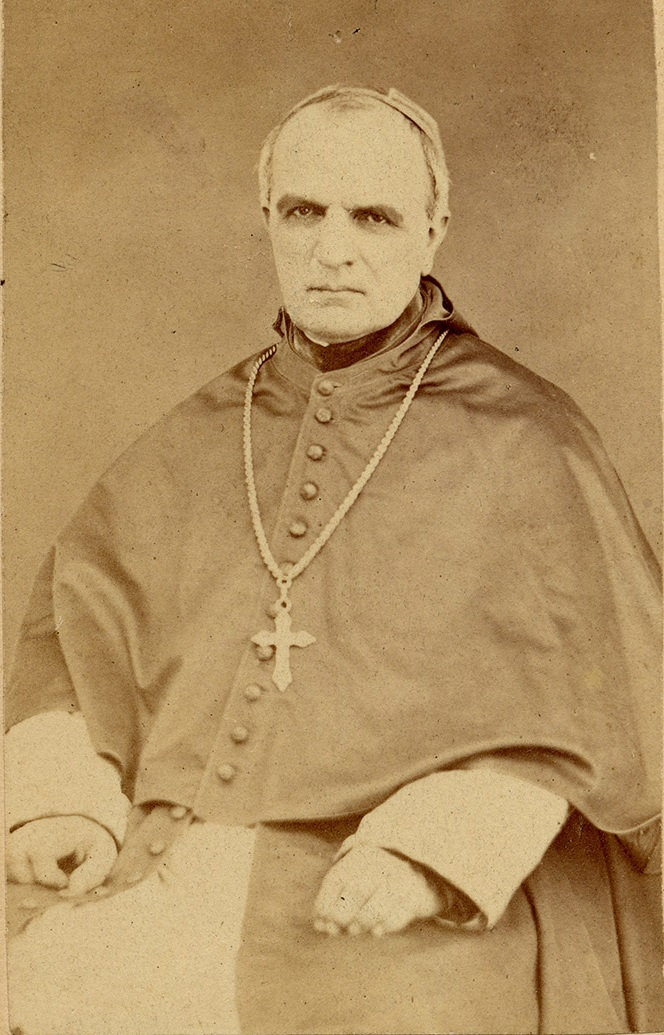 José Hipólito Salas, obispo chileno.